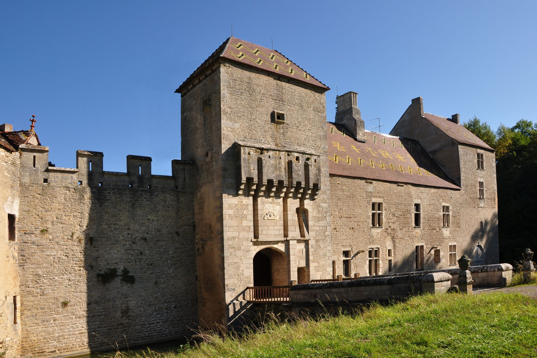 Marigny-le-Cahouët, Bourgogne, Côte-d'Or, le château de Marigny-le-Cahouët. Les douves sont alimentées par une branche de la Lochère, un affluent de la Brenne elle-même affluent de l'Armançon.